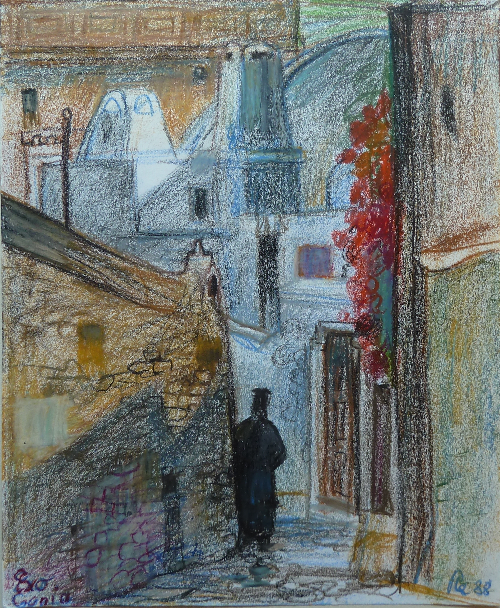 Bild von Emil Ressel mit dem Titel: Gasse in Santorin